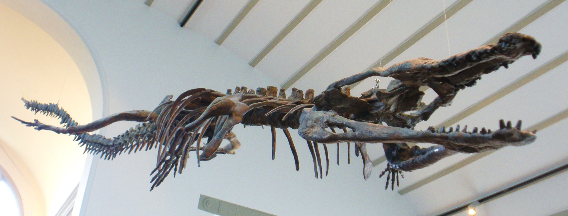 Fossil of Machimosaurus, an extinct crocodile Took the photo at Musee d'Histoire Naturelle, Brussels